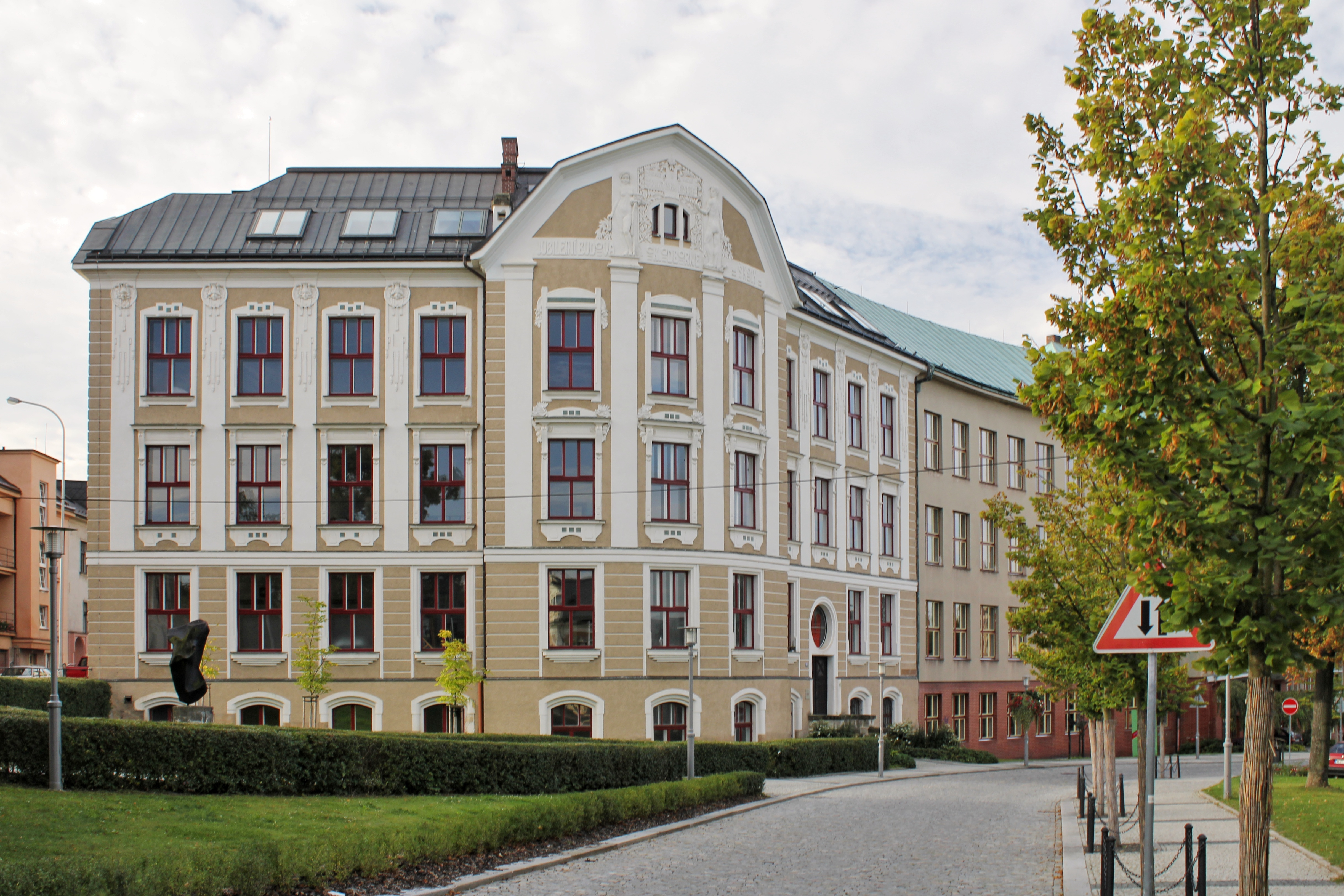 Střední škola uměleckoprůmyslová, Skálova 373, Turnov